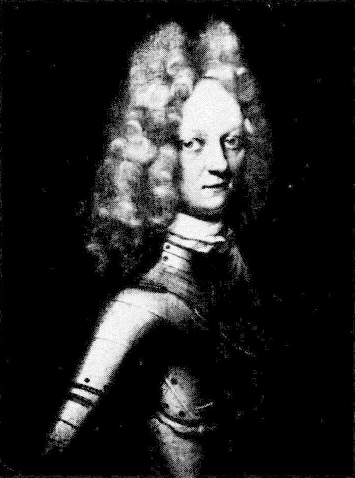 Porträt des schwedischen Offiziers Christian Albrecht von Grothusen (1680-1715).